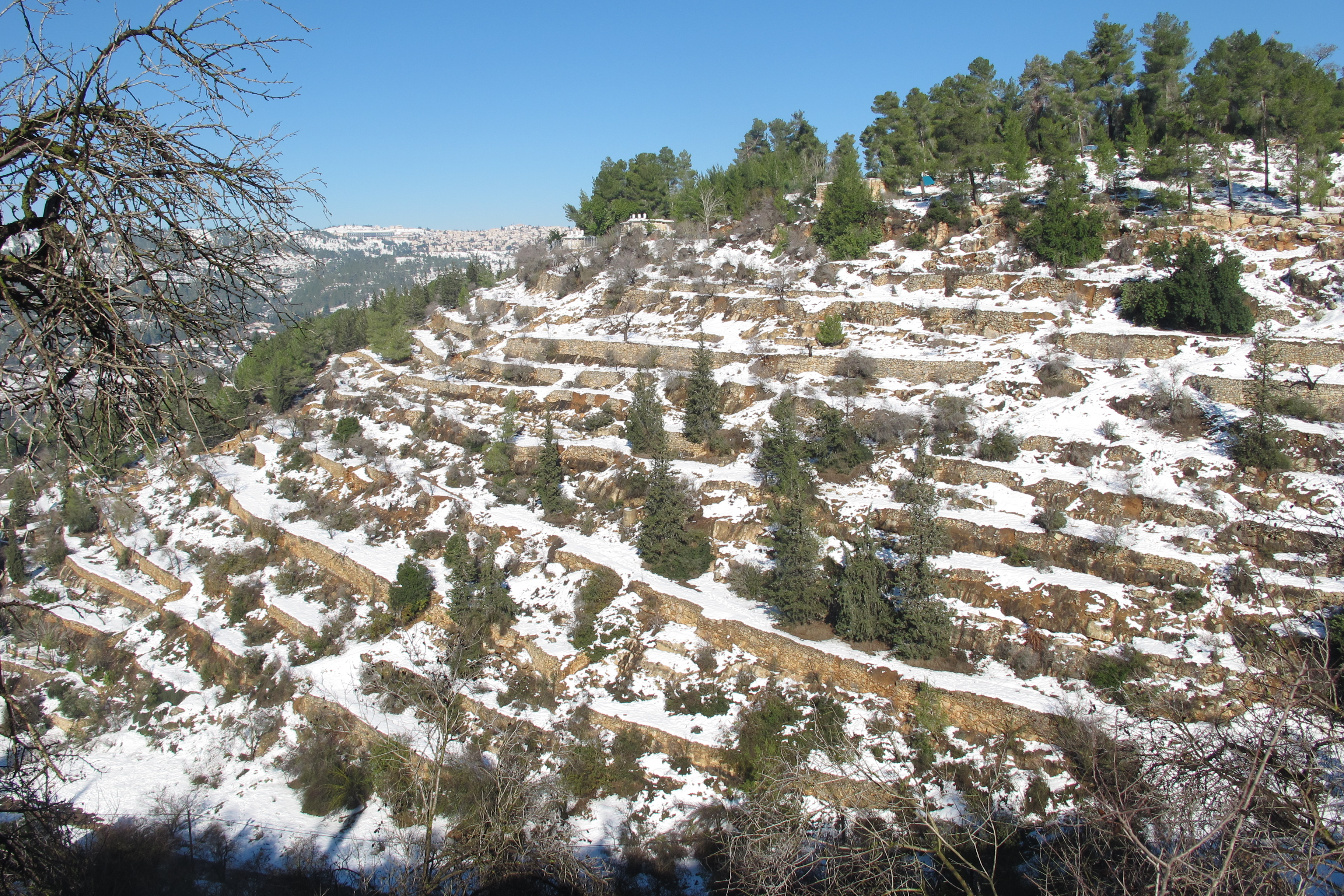 עין כרם - נוף טרסות בשלג